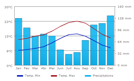 Climat La Corogne - Galice - Espagne